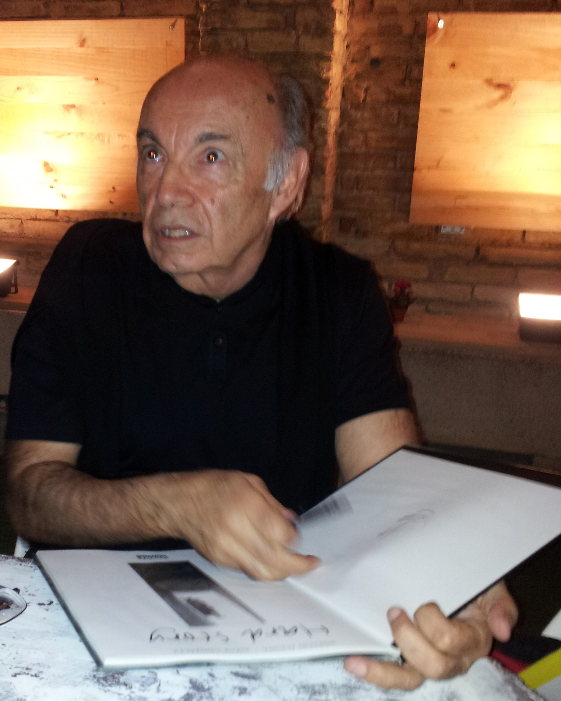 Horacio Altuna.